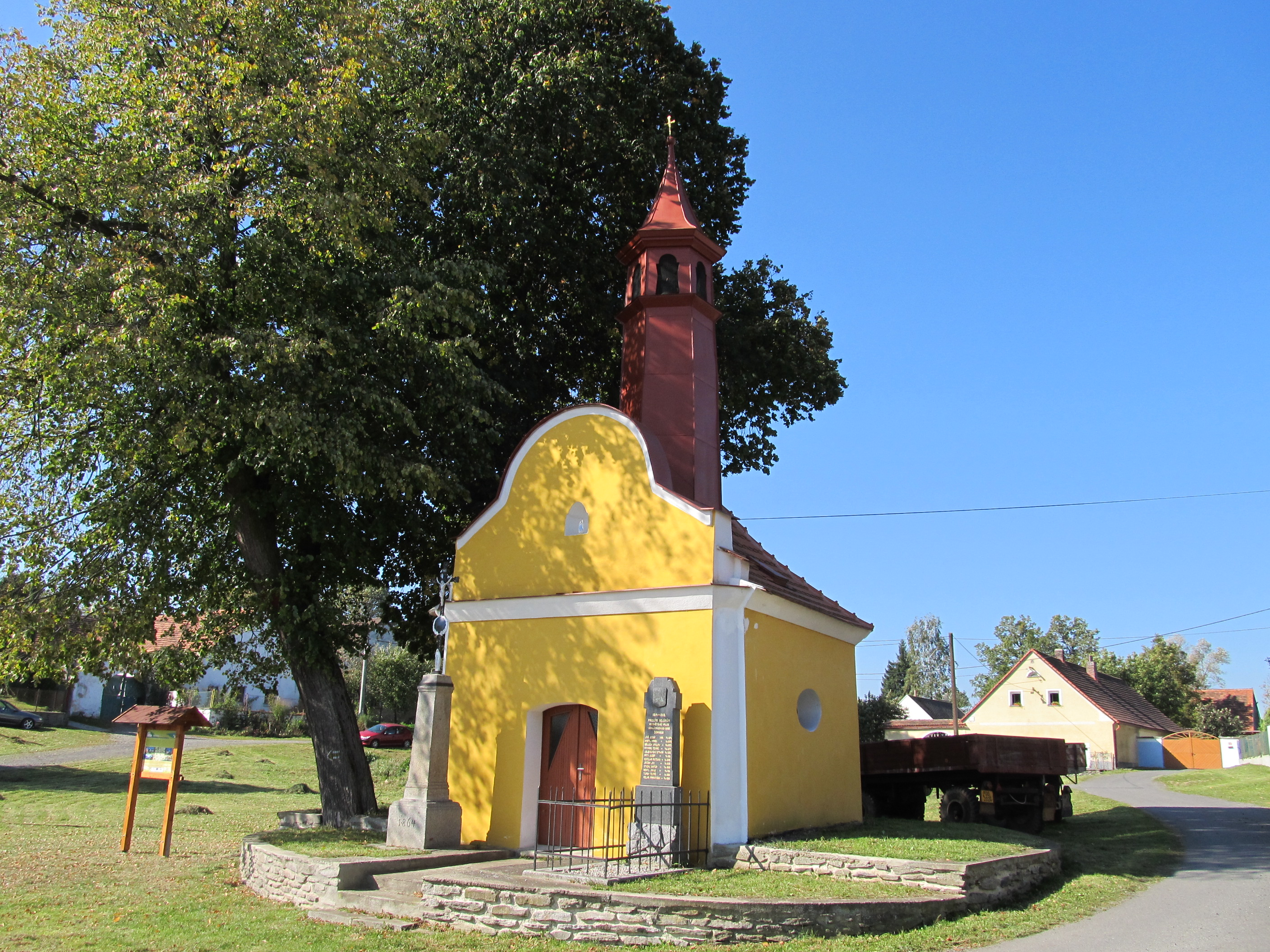 Černíč - náves s kaplí sv. Martina